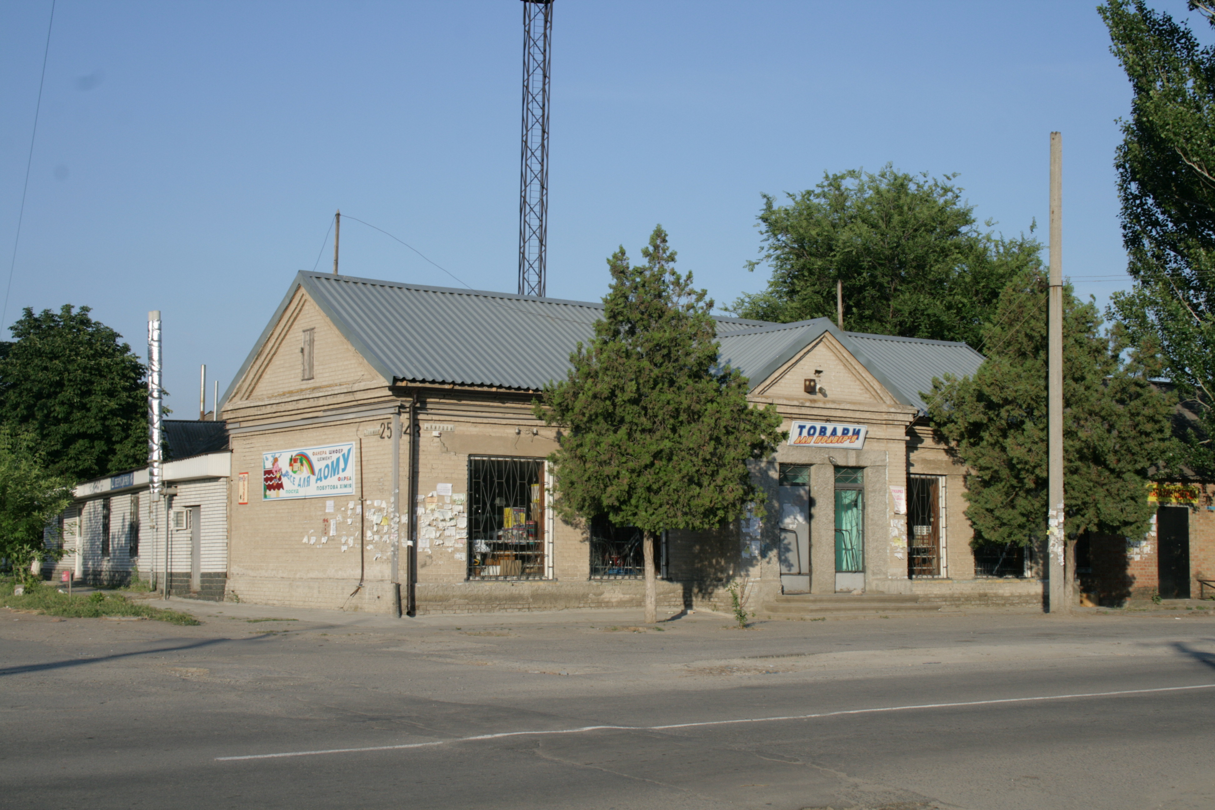 Магазин в центре Кушугума, на пересечении улиц Тельмана и Кирова.